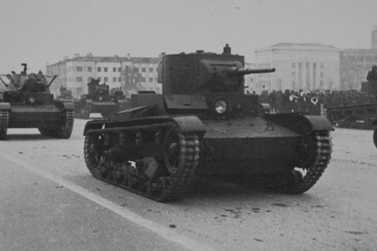 Легкие пехотные танки Т-26. Военный парад в Куйбышеве 7 ноября 1941 г.